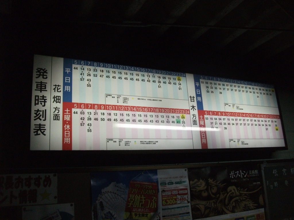 西鉄甘木線大城駅ホーム掲示の時刻表